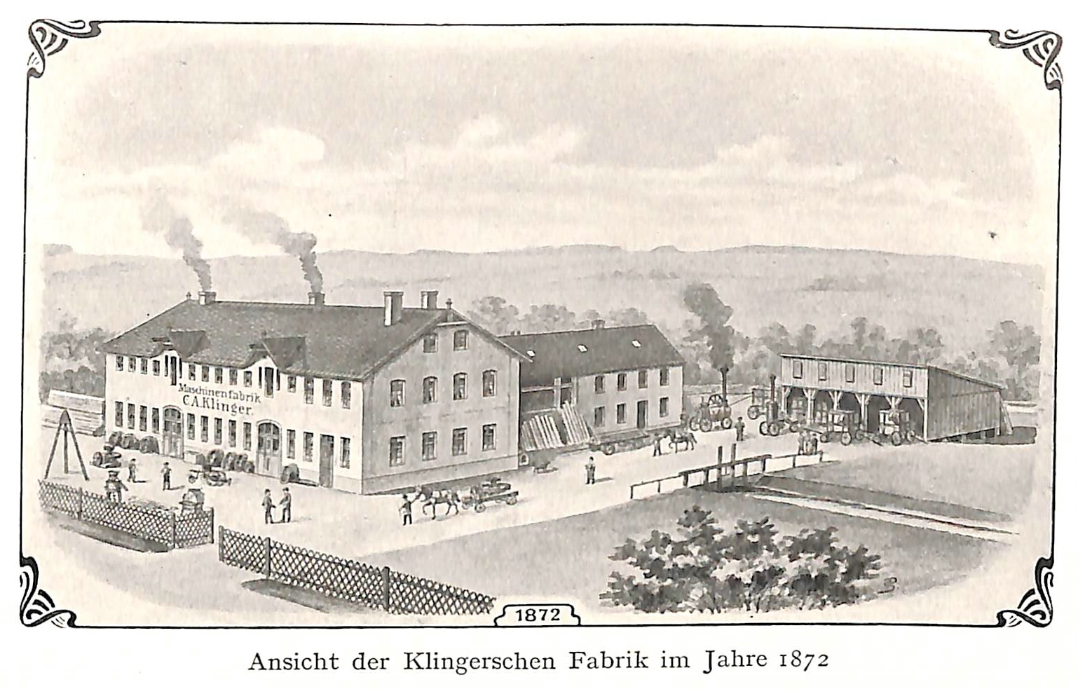 Alstadt-Stolpen - Ansicht des Landmaschinenfabrik C.A. Klinger